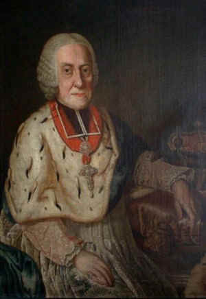 Joseph Ignaz Philipp von Hessen-Darmstadt (1699-1768), Bischof von Augsburg; Portrait im Hochstiftmuseum Dillingen an der Donau